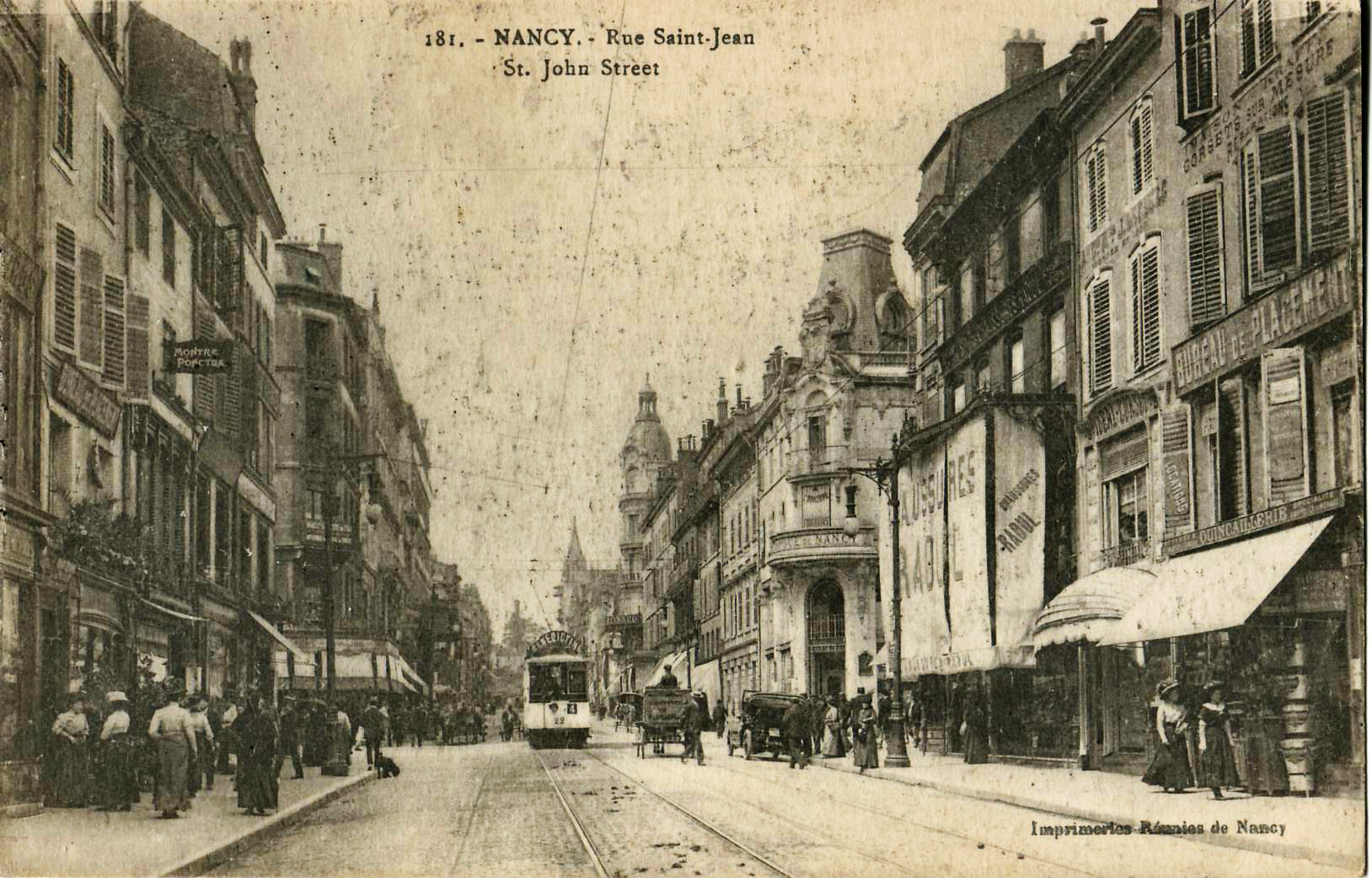 Carte postale ancienne éditée par les Imprimeries réunies de Nancy, n°181 :NANCY - Rue Saint-Jean